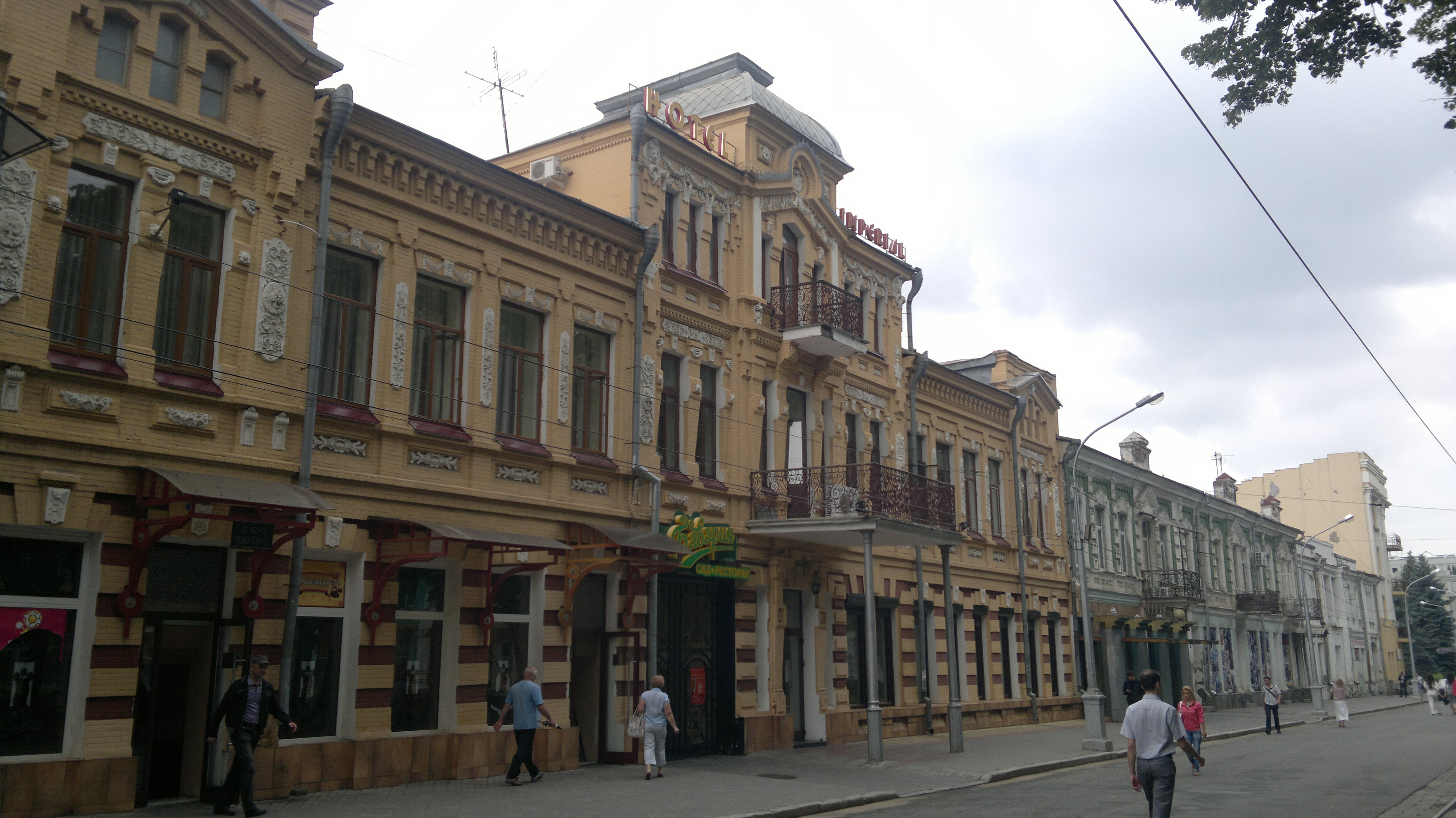 Проспект Мира (Владикавказ)